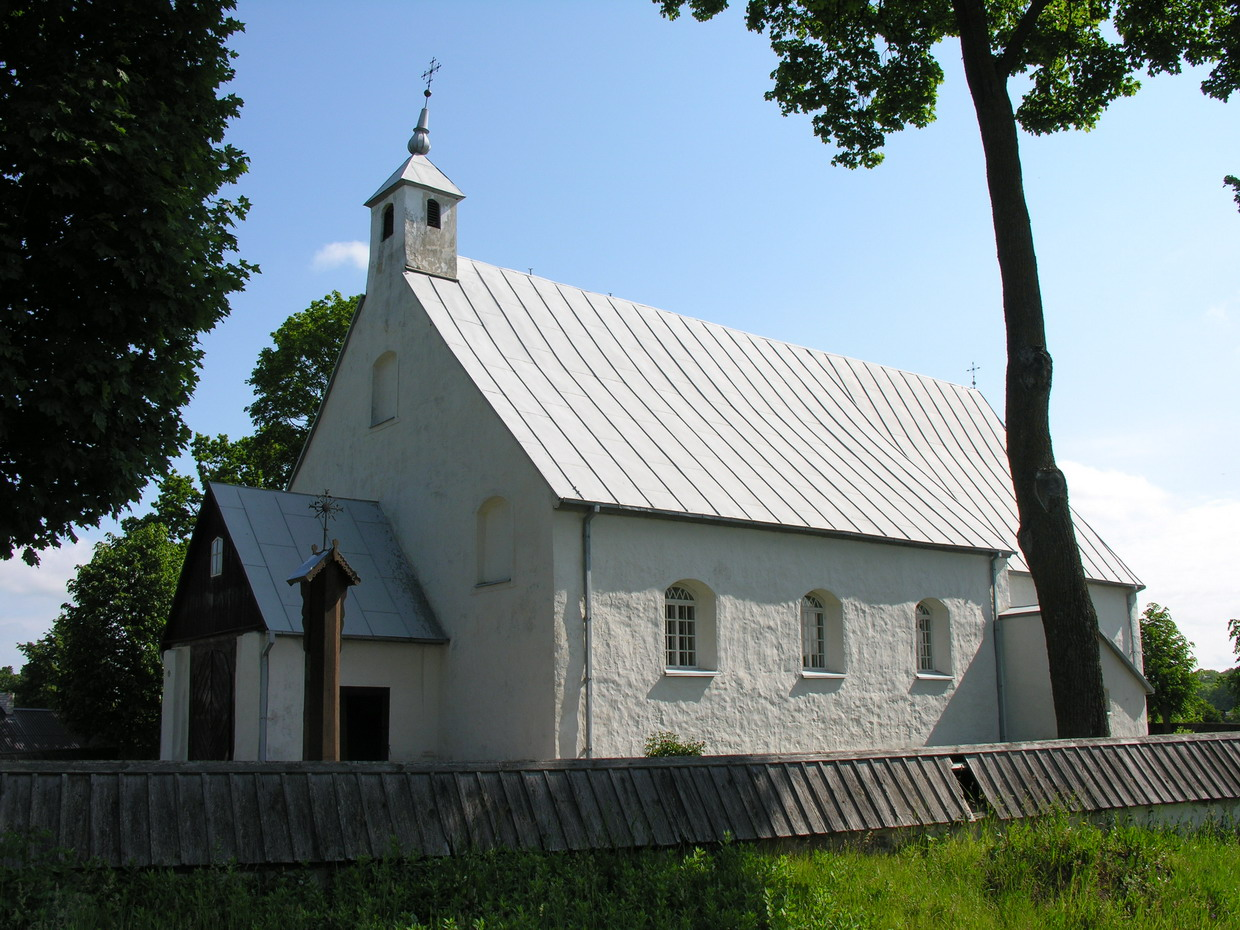 Žagarės regioninis parkas: Senosios Žagarės bažnyčia